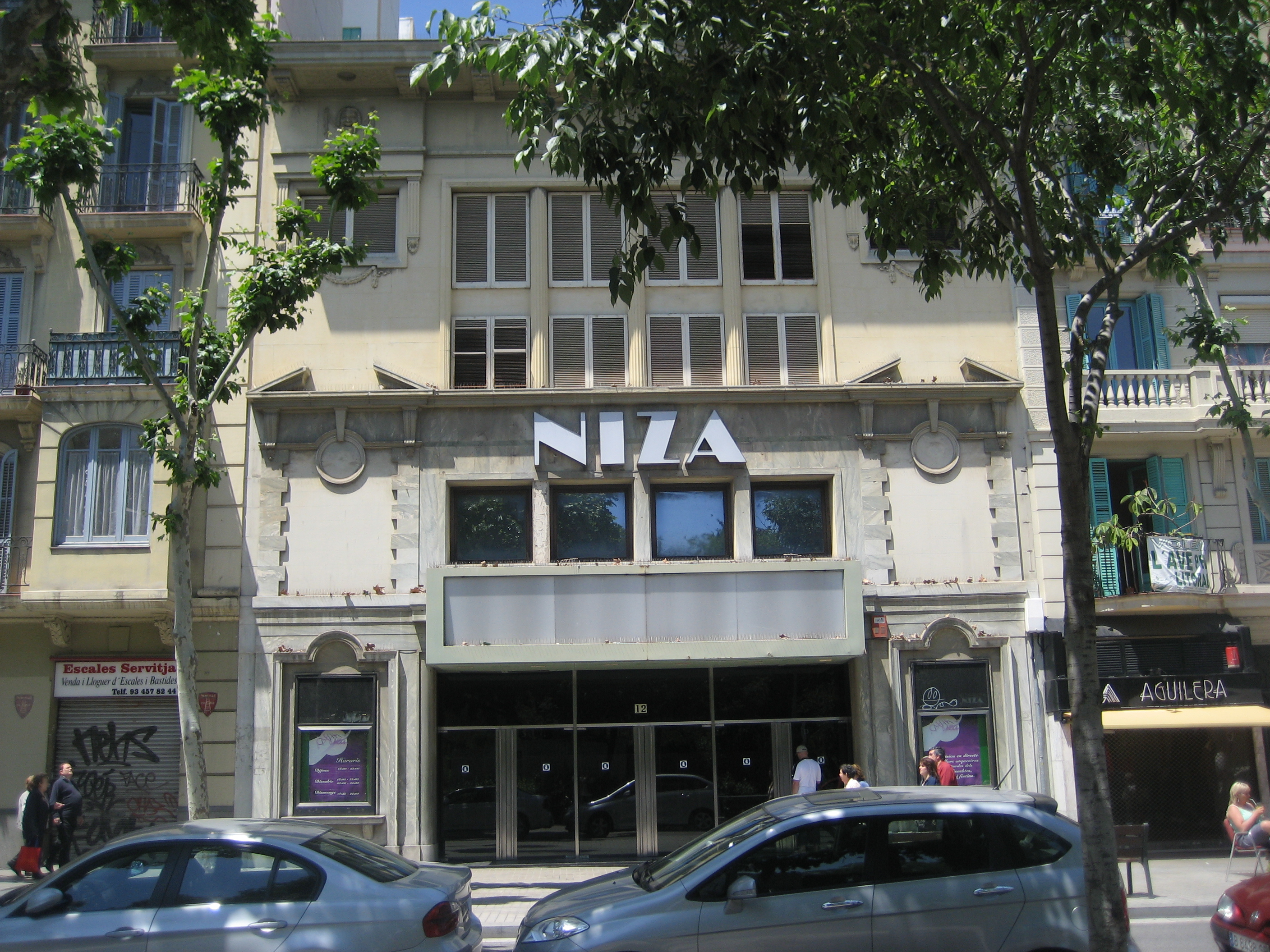 Cinema Niza (Plaça Sagrada Família, 12 - Barcelona)